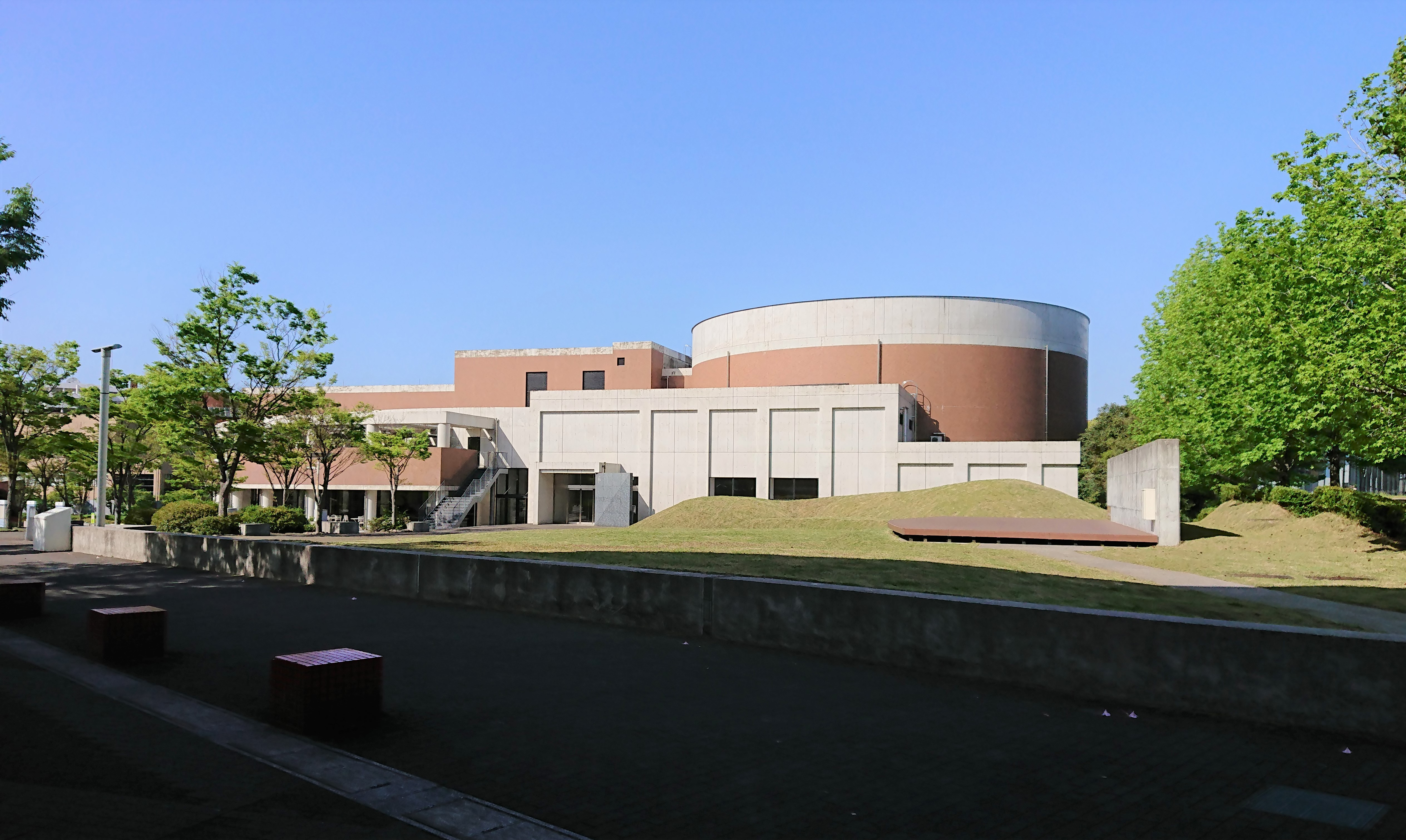 九州国際大学KIUホール 2019年4月27日本人撮影